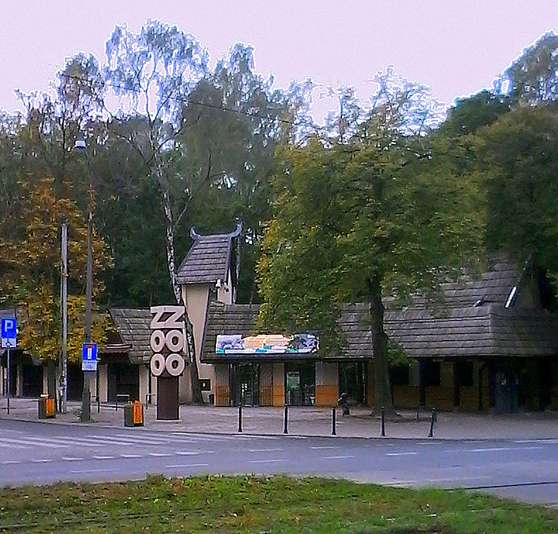 Wejście do Zoo